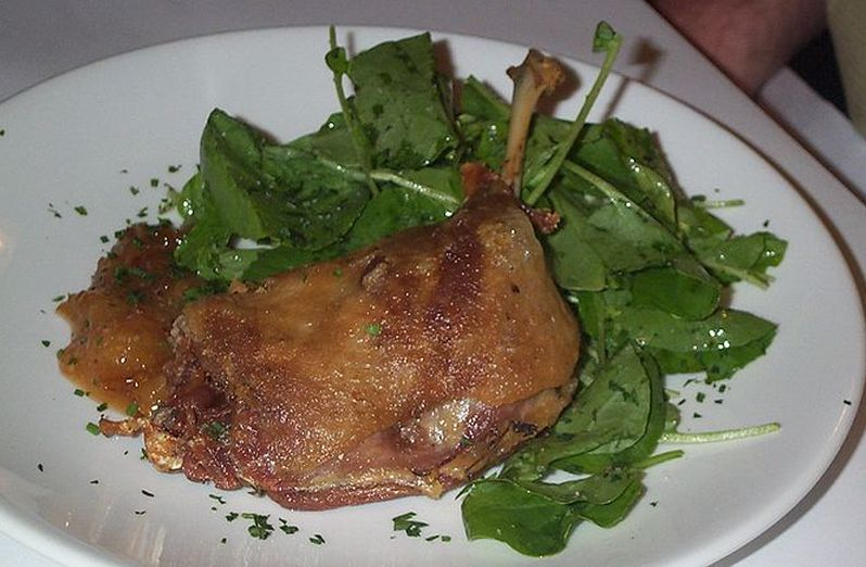 Una cuixa d'anec confitada. És molt fàcil de preparar, es treu de la llauna, s'escalfa en una cassola amb una mica del propi greix que hi ha a dins i es serveix. A la foto amb una amanida de fulles verdes. Les carns conservades així 8cuites a foc suau en molt de greix) són molt usuals a tota Occitània.